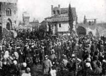 Stabilimento cinematografico di Firenze Rifredi. Scene di massa durante la lavorazione di Frate Francesco , (1927) prodotto dalla I.C.S.A. - Roma-Firenze